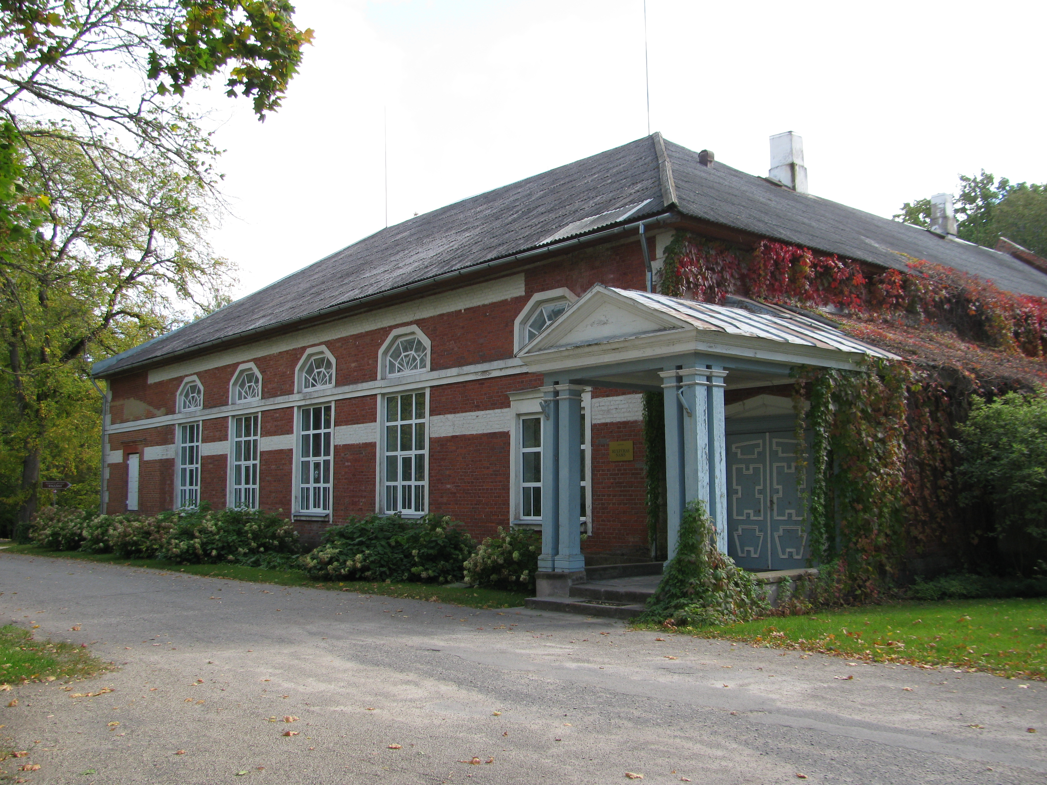 Kungu māja, Trapenes pagasts